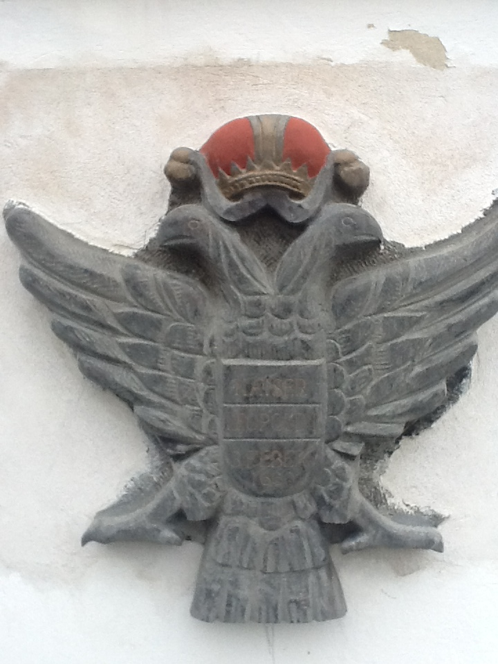 Schwarzer Adler-Privilegium für Kaisersteinbruch (aus hartem schwarzem Marmorgestein)